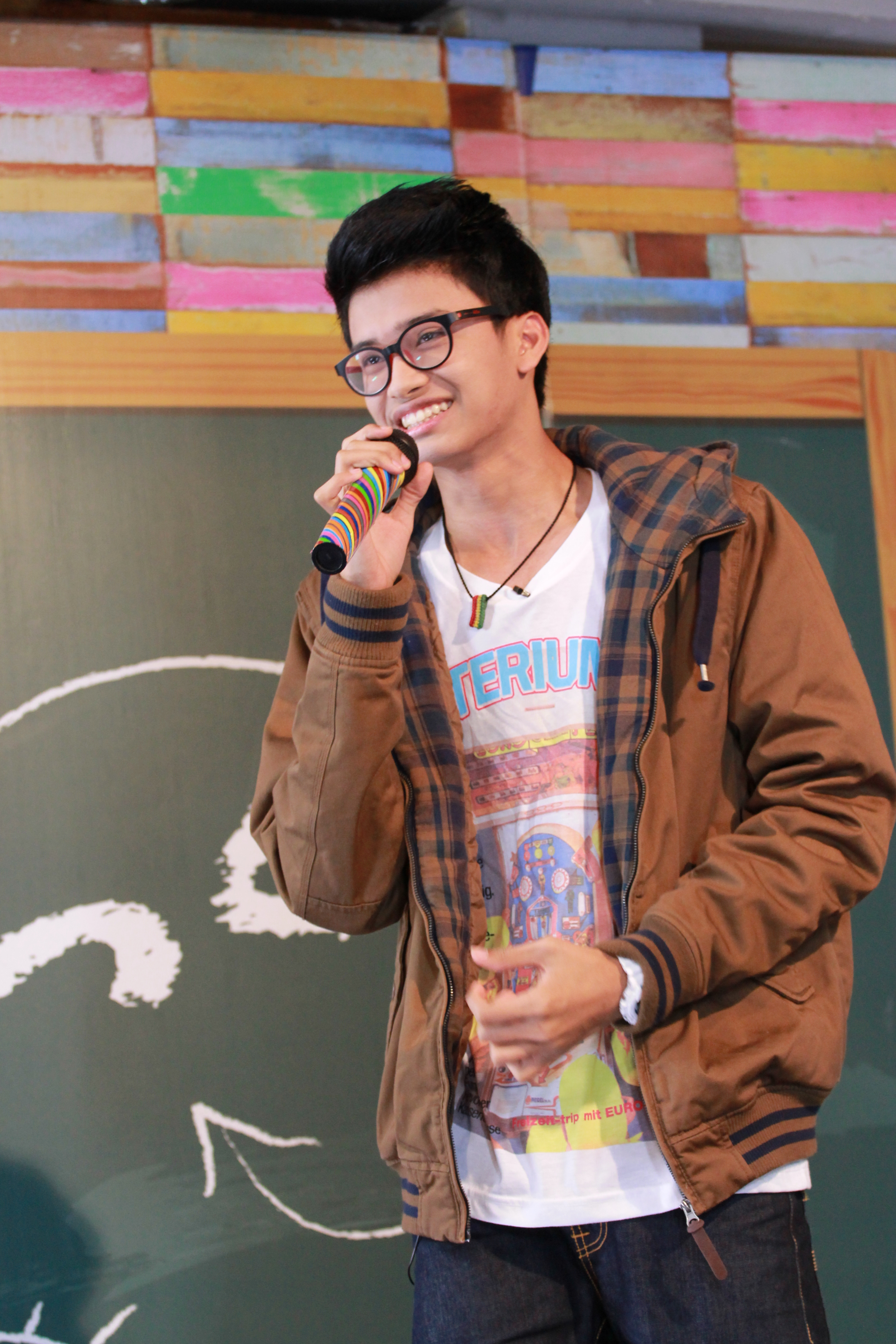 Nont Tanont on 28 Sep 2013